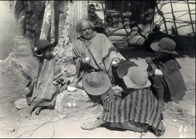 Foto de La Guerra Gaucha (1942), de Lucas Demare. En la foto Enrique Muiño.